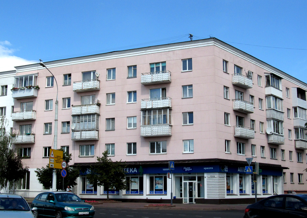 Брэст. Вуліца Леніна, 38